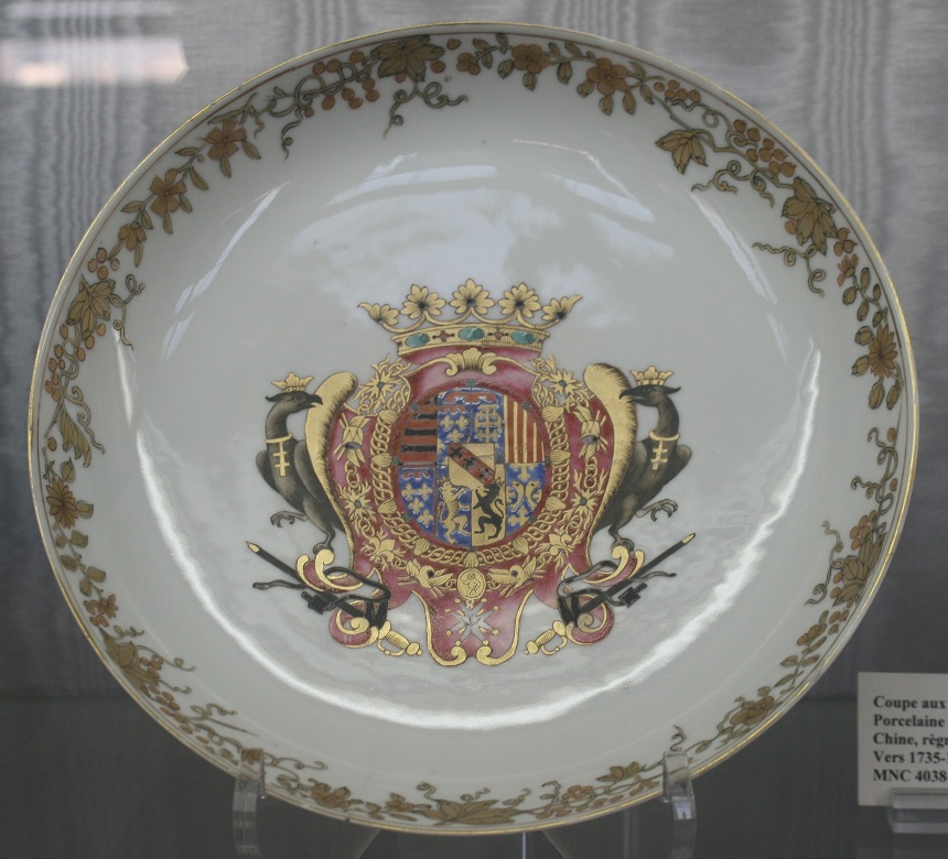 Assiette aux armes de Charles de Lorraine Grand Ecuyer de France (Musée National de la Céramique, Sèvres)